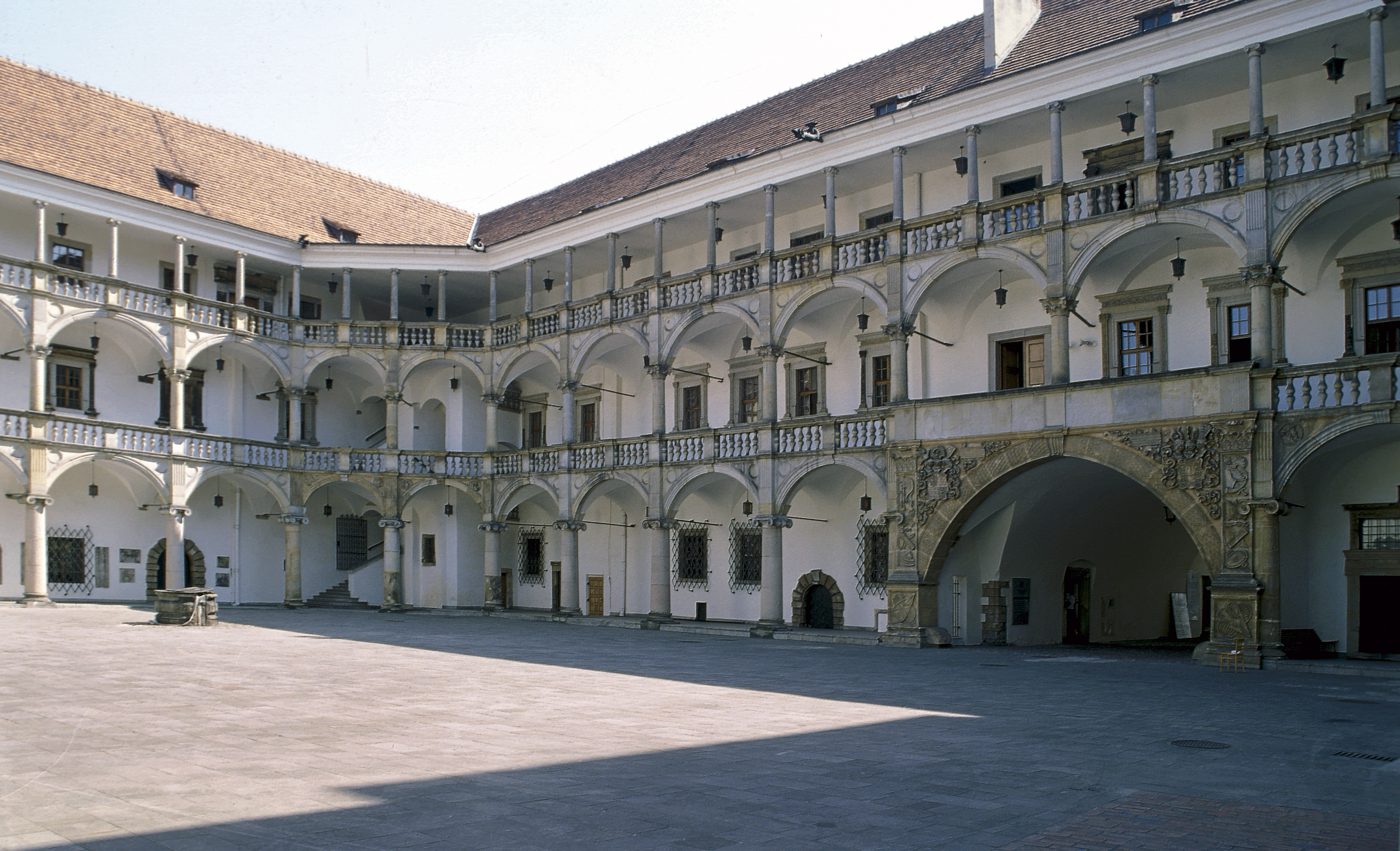 Poland, Brzeg Castle